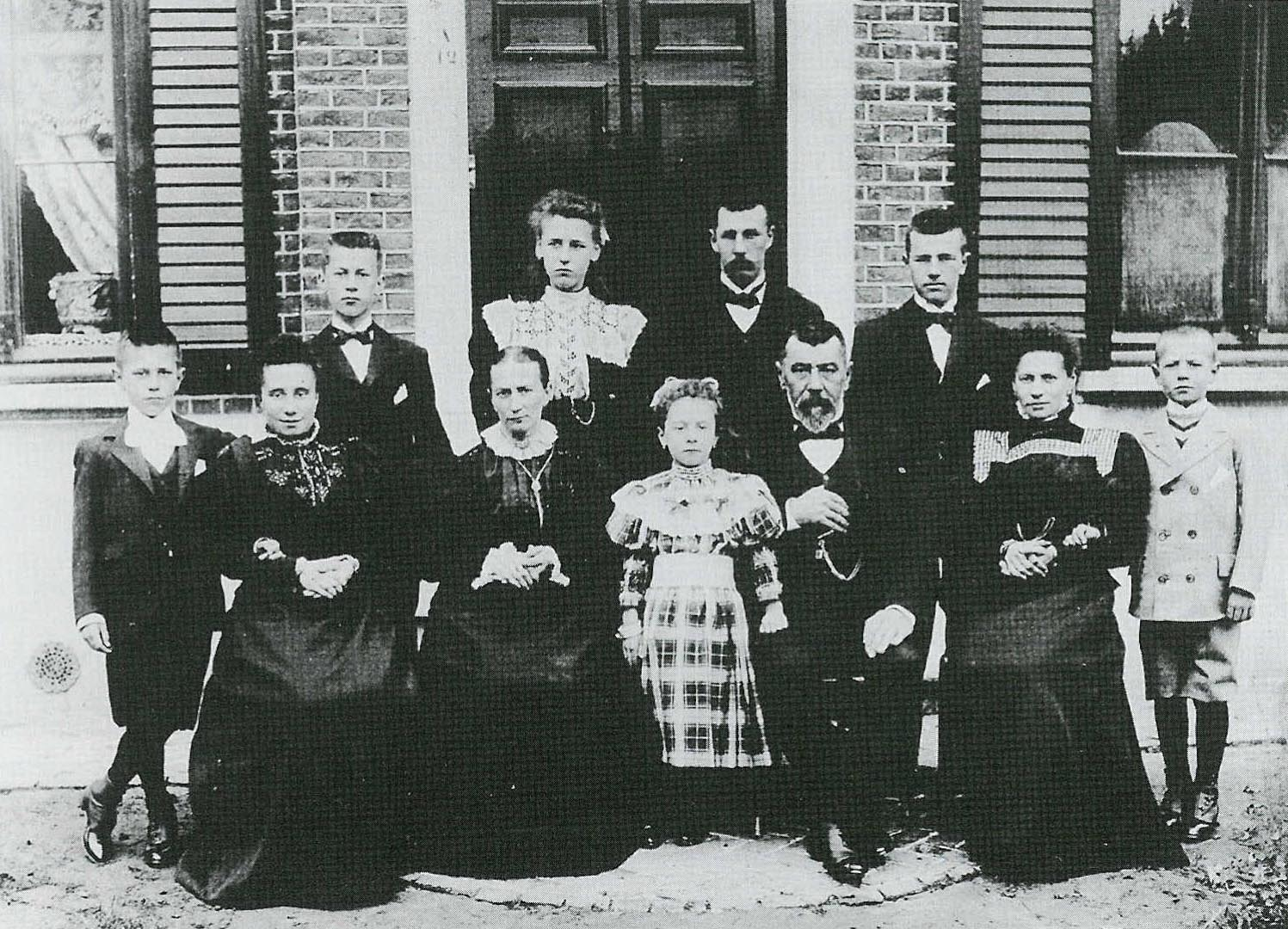 August Meiresonne - bierbrouwer en burgemeester van Landegem - met zijn gezin eind 19de eeuw - Nevele - België